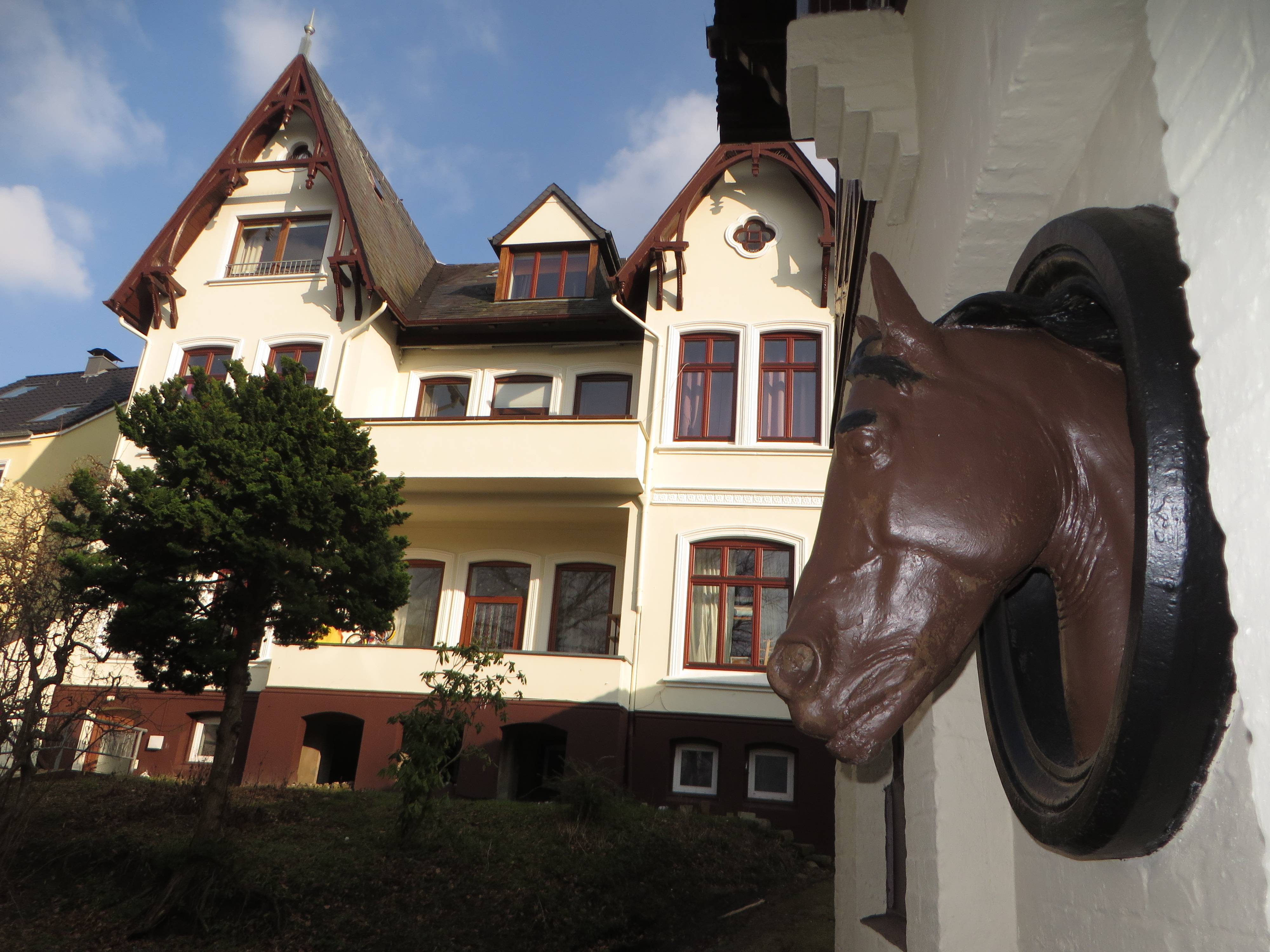 Pferdekopf beim Dienstwohngebäude des Divisionskommandos (Flensburg-Jürgensby 2018), Bild 02